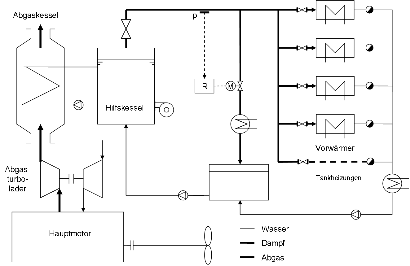 Abgasnutzung, Abgaskessel als Dampferzeuger und Wärmetauscher als Dampfverbraucher, typisches Heizdampfsystem eines Schiffes